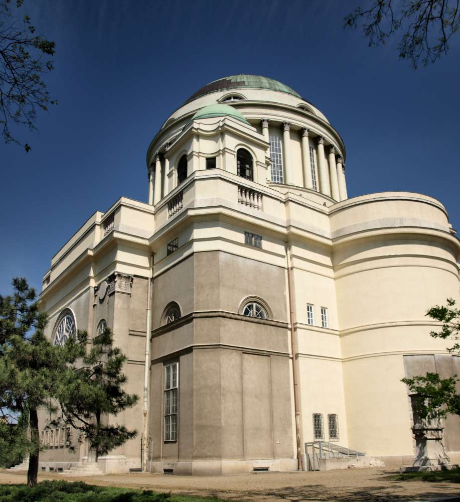 Tisztviselőtelepi Magyarok Nagyasszonya római katolikus plébániateplom. Épült 1924 és 1931 között, Kismarty-Lechner Jenő tervei szerint